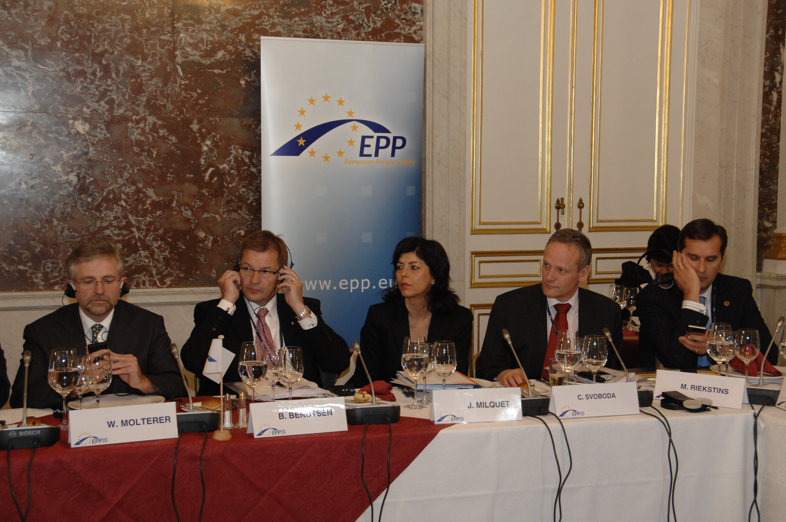 EPP Summit 19 June 2008